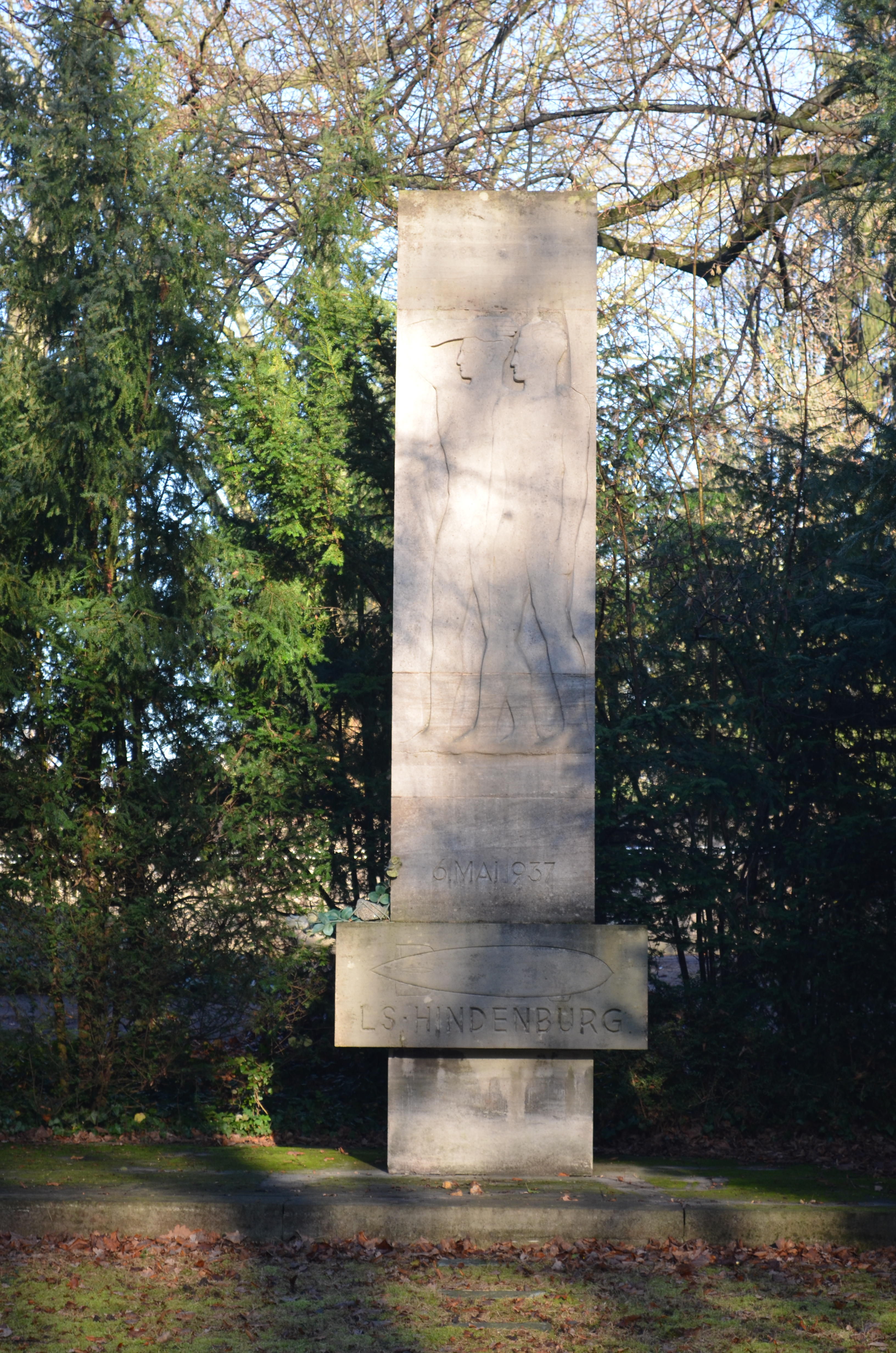 Frankfurt, Hauptfriedhof, Grab XV 697 Denkmal Luftschiff „Hindenburg“